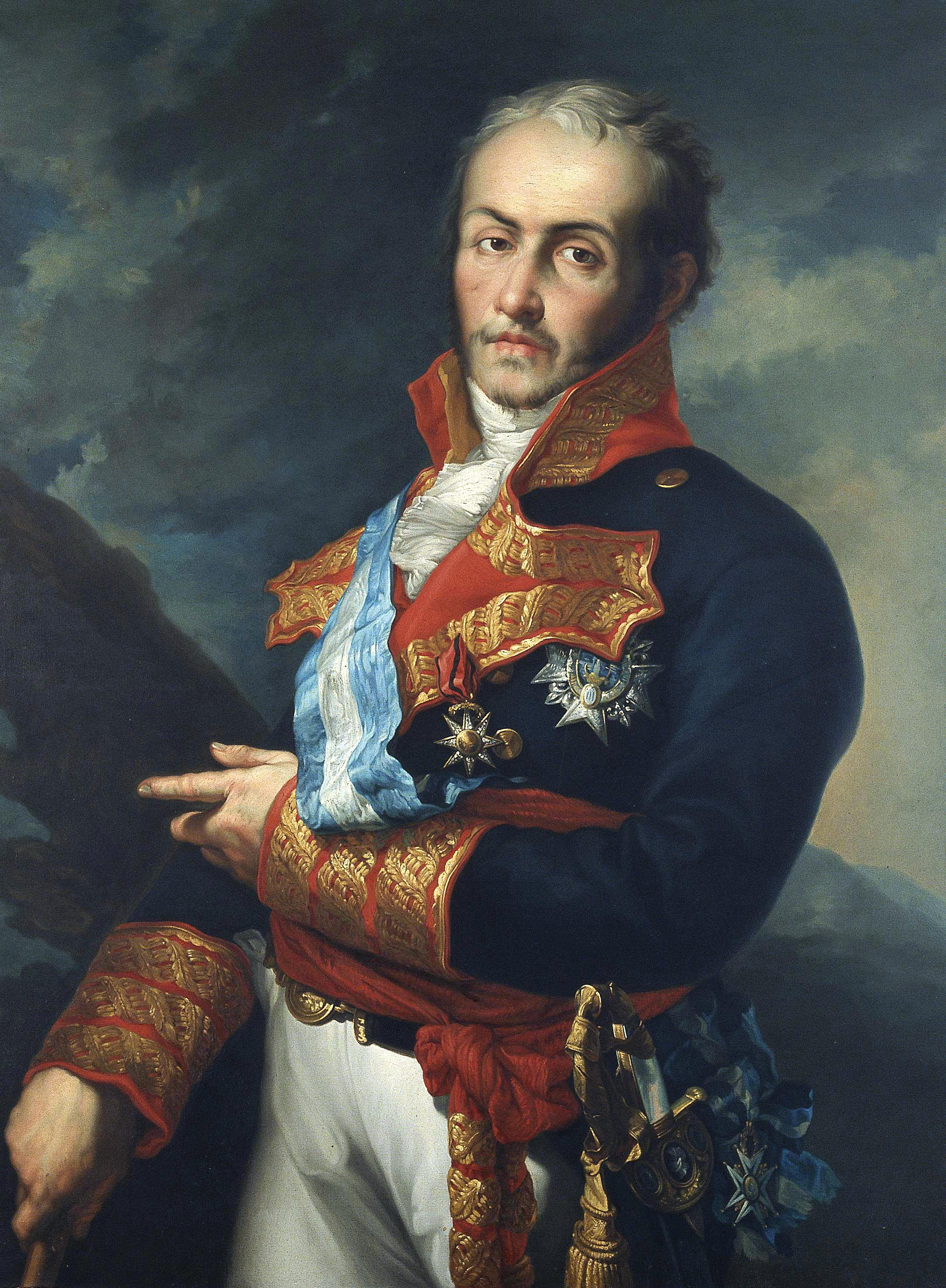 Retrato del militar español Pedro Caro y Sureda (1761-1811), III marqués de la Romana. Esta obra es una copia realizada por Eduardo Carrió del retrato del marqués pintado por Vicente López Portaña.